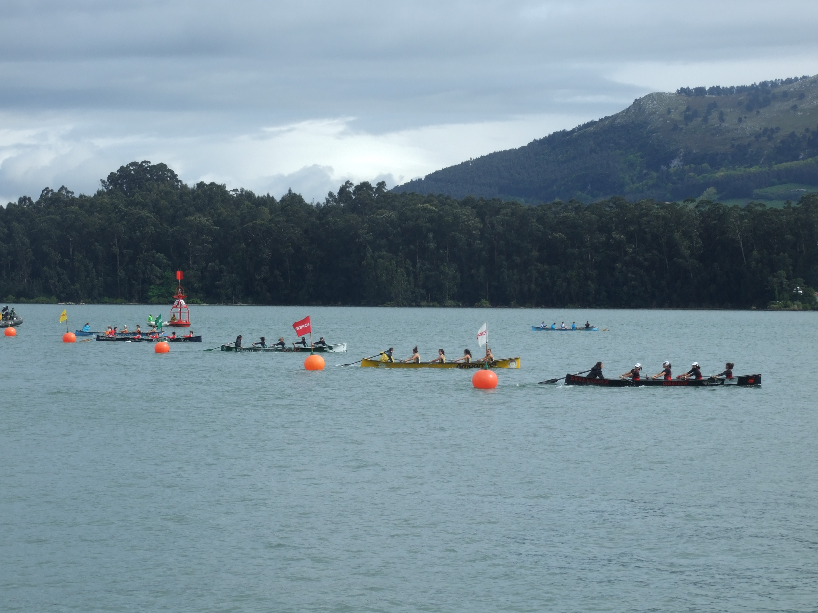 Campeonato de España de Bateles en Camargo, Cantabria. Tanda femenina.